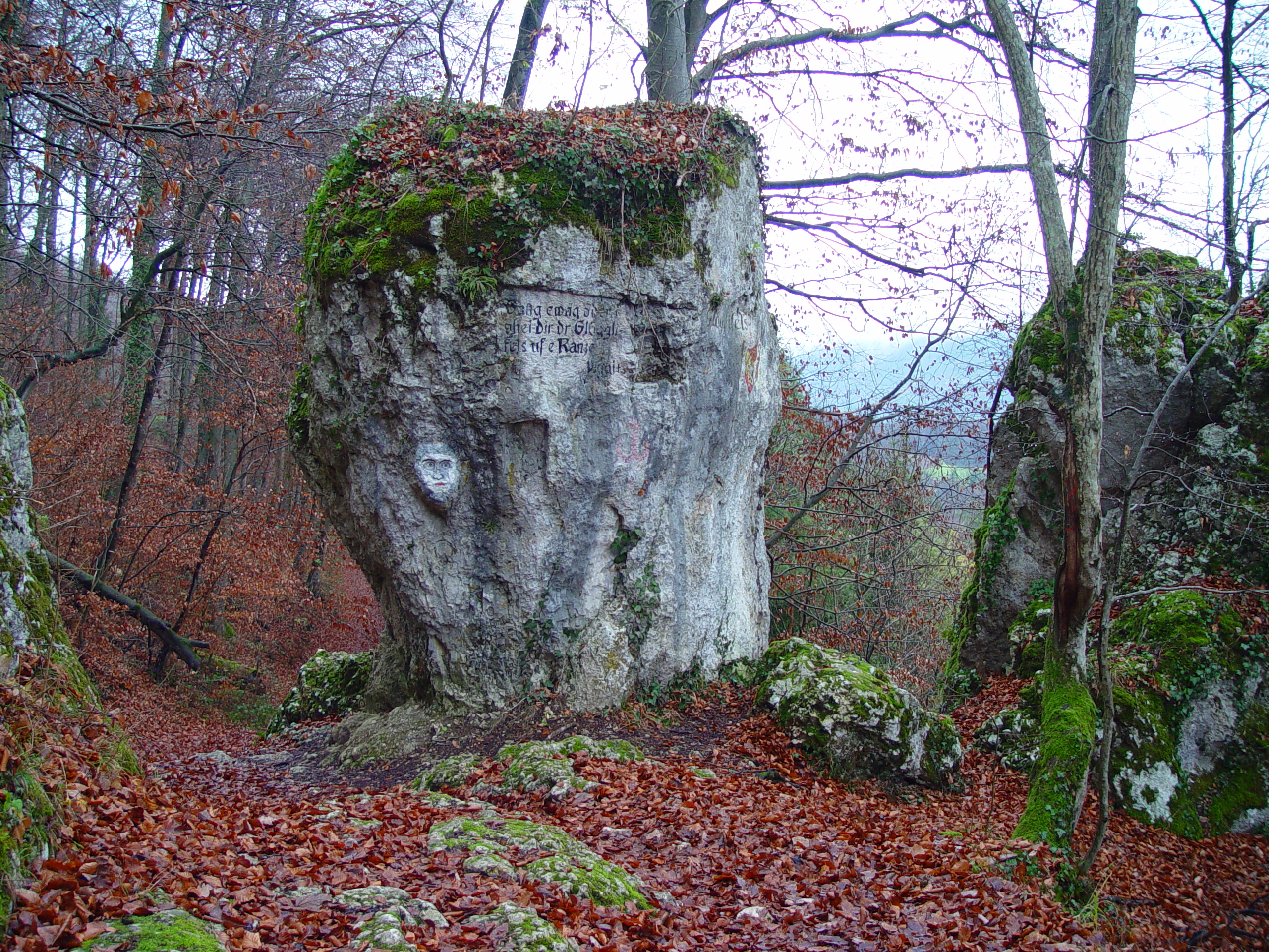 Ein imposanter Fels ca. 5 Meter hoch mit Abbildung eines bunt bemalten Gesichtes, welches auf dem Fussweg von Ruine Pfeffingen nach Nenzlingen die Wanderer begrüsst